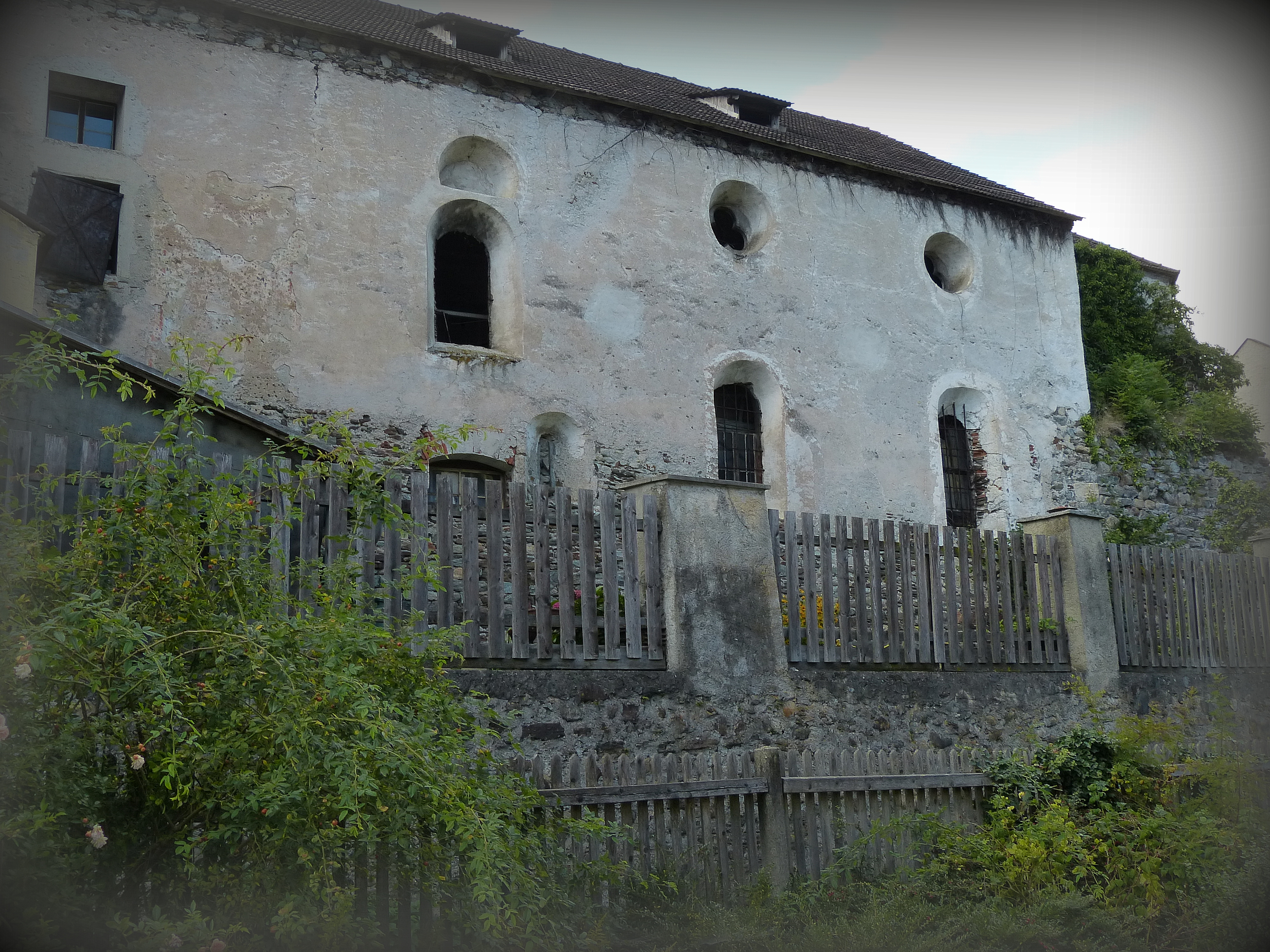 Ehem. Stadtpfarrkirche, Pankratiuskirche mit Stadtmauer, heute Magazin,Ostseite